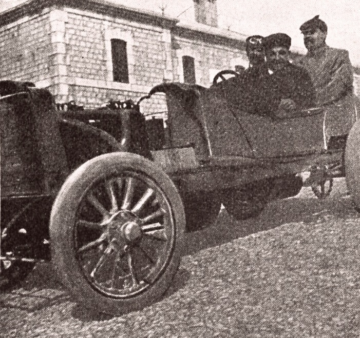 Le photographe Rol à bord de la voiture Mors de Joseph Collomb en 1905, au Mont Ventoux (peu avant son décès) - La Vie au Grand Air du 29 septembre 1905, p.806